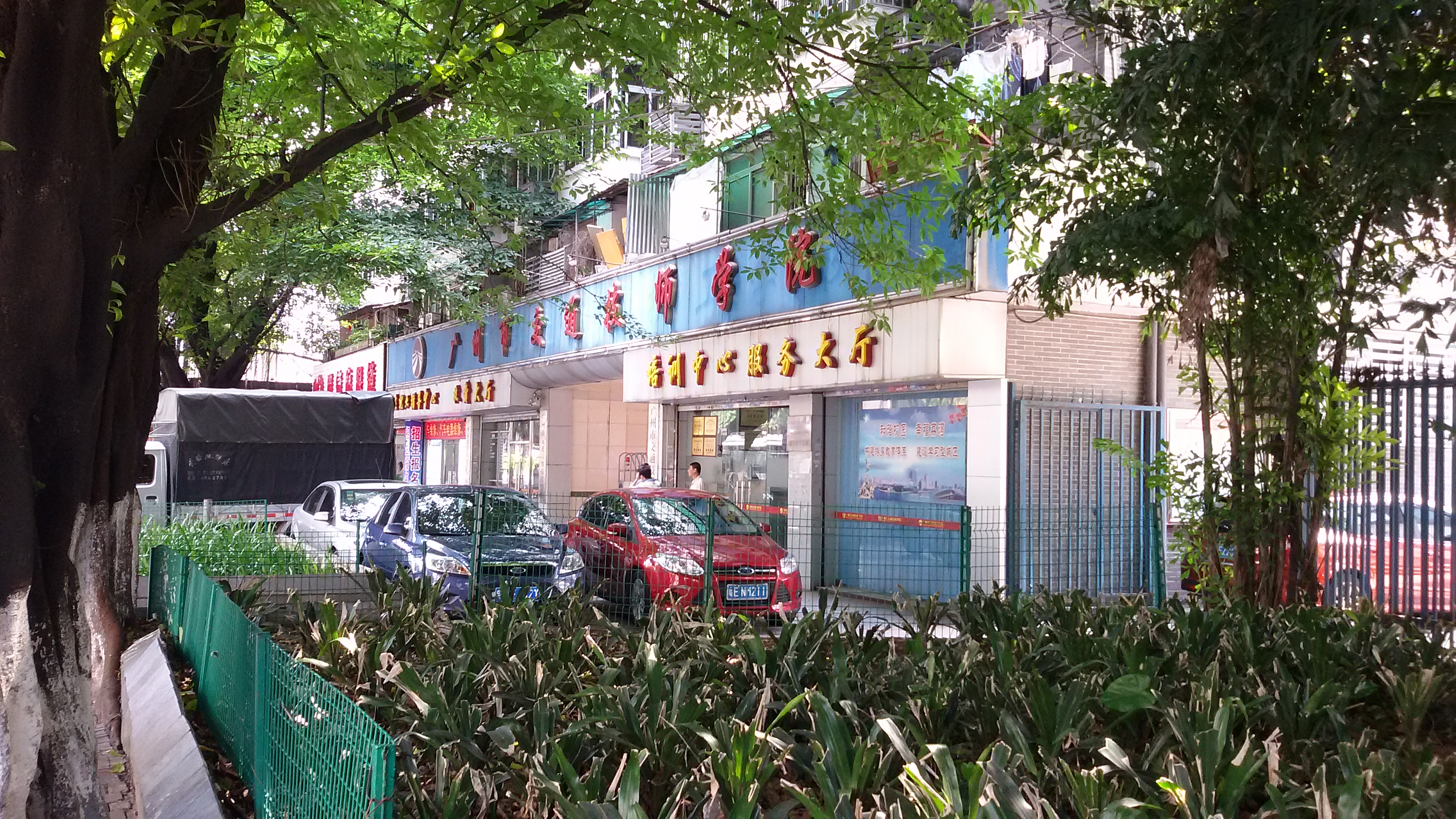 粵語: 廣州市交通高級技工學校